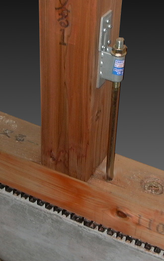 ホールダウン金物_ビス止め式_15kN用